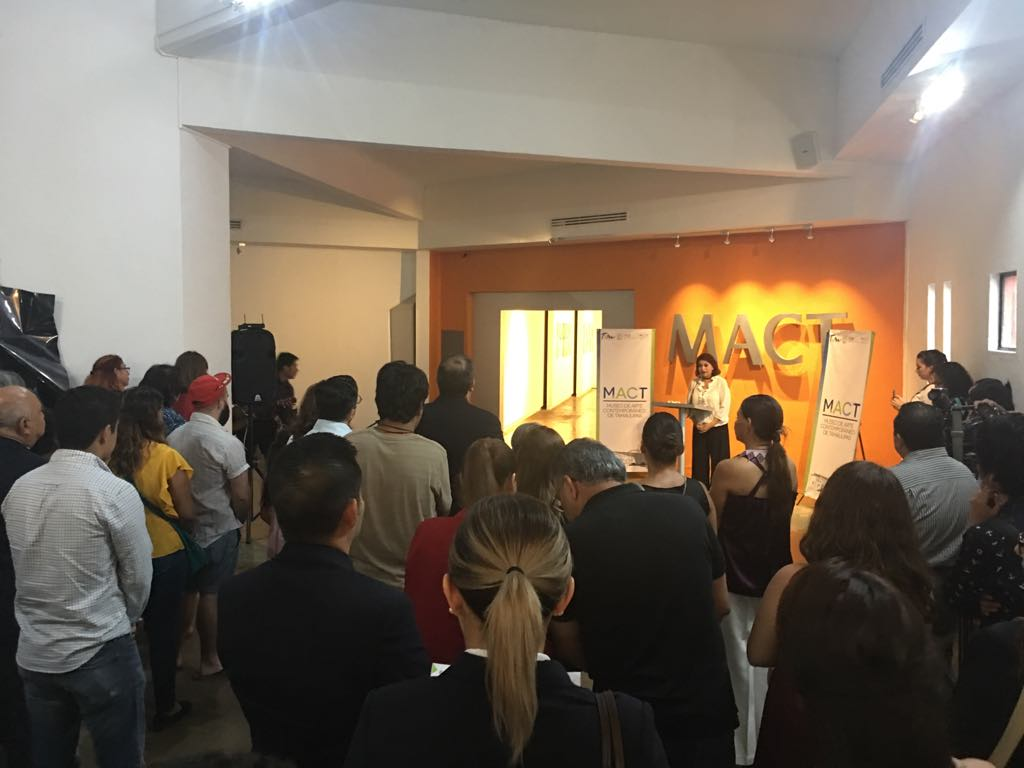 Inauguración de una exposición en el MACT.